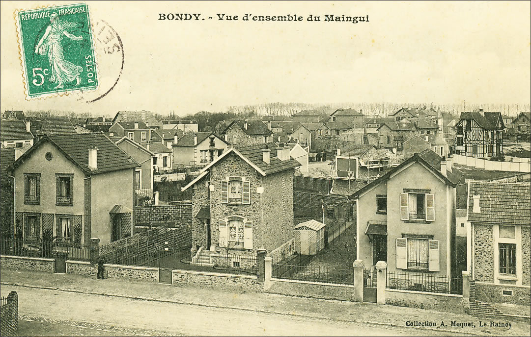 Bondy, Maingui